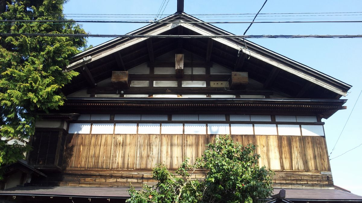 増田の町屋、妻入りの主屋（松浦千代松家主主屋）